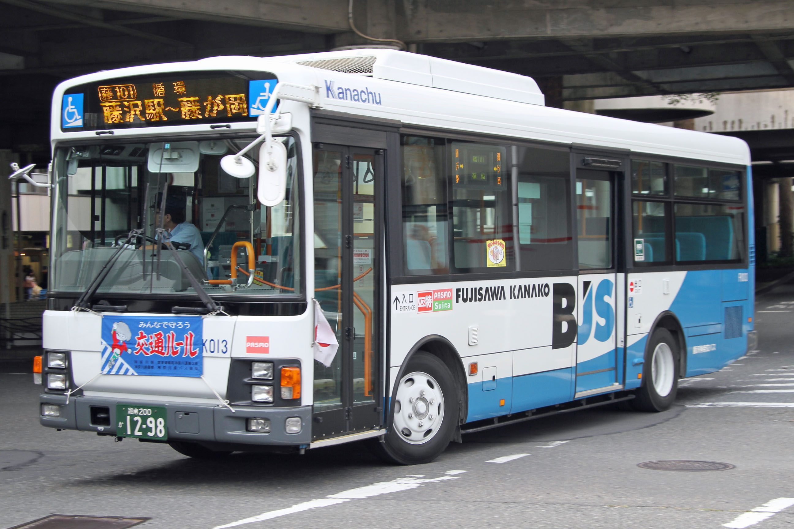 Fujisawa Kanako Bus car 藤沢神奈交バスの車両